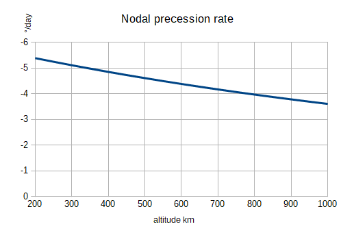 Uzlová precesia závislosť od výšky obežnej dráhy